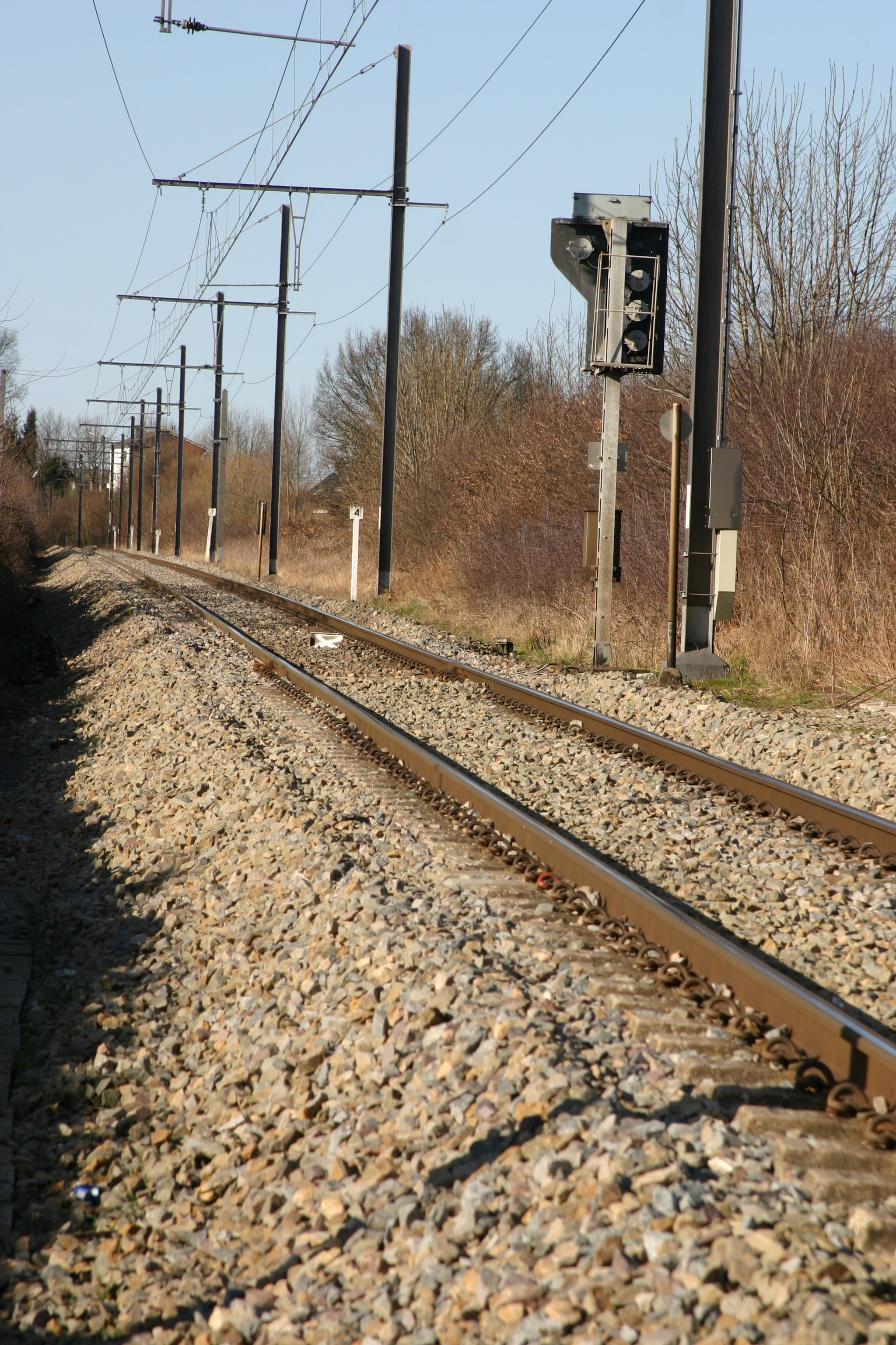 Linn 49 gesinn vun der Barrière vun der Buschbergerstrasse zu Kettenis, a Richtung Eupen.